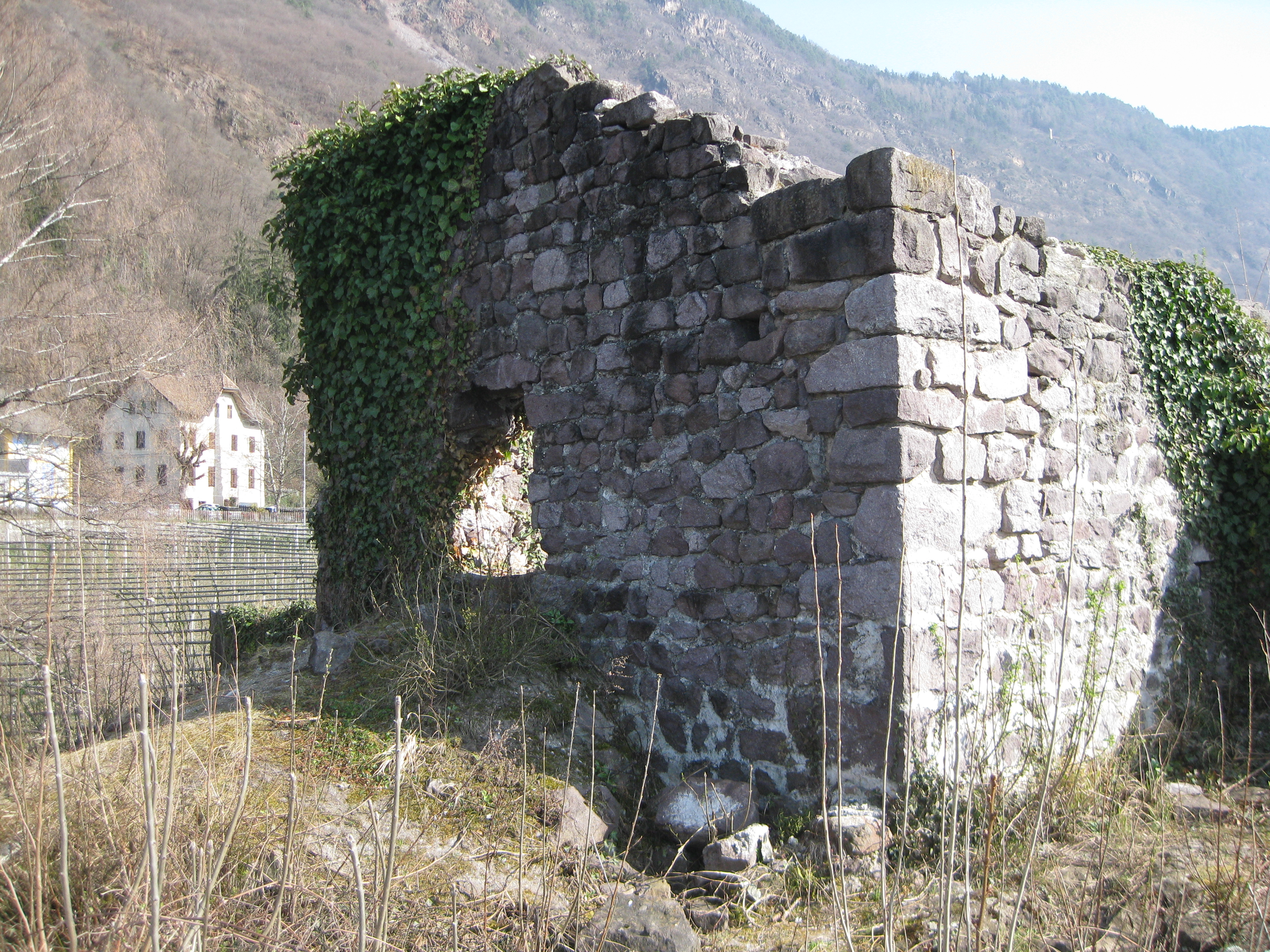 Ruine Burgstall in Südtirol